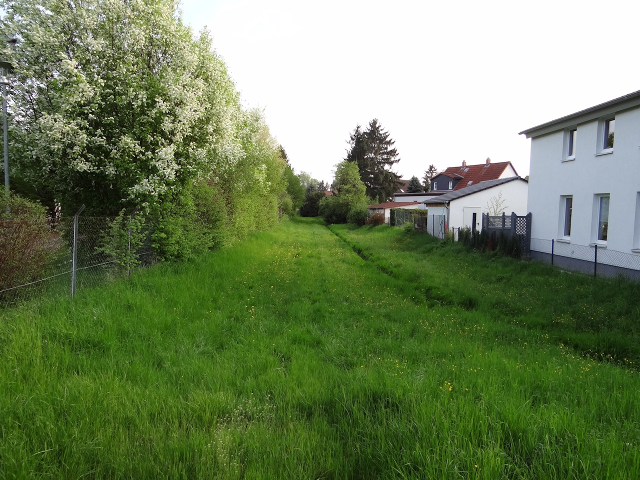 Offener Verlauf des Jödebrunnengrabens bei der Weinbergstraße, Blickrichtung Süden zur Altfeldstraße.